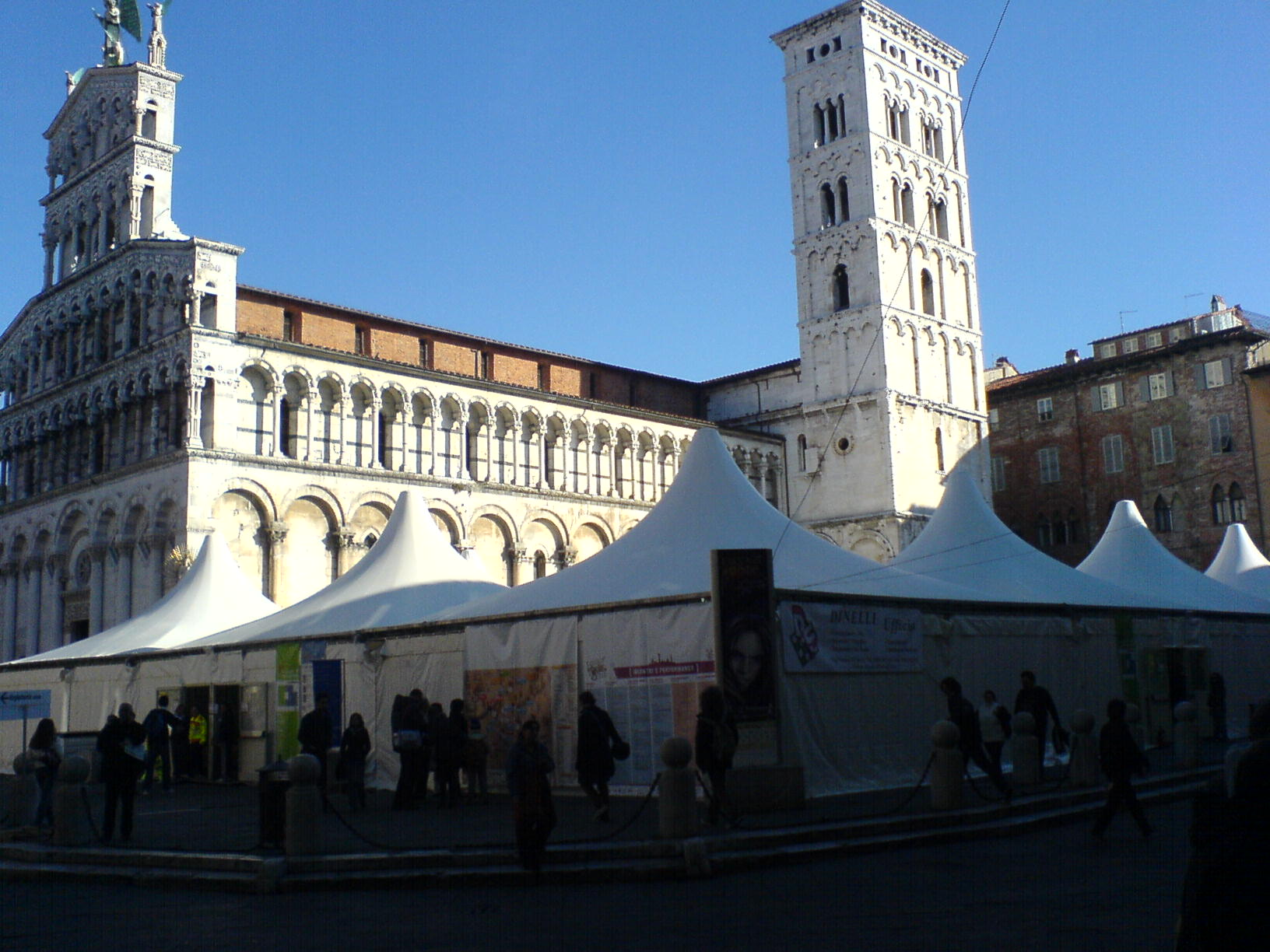 A Lucca Comics pavilion in piazza San Michele, Lucca, 2007-11-04.